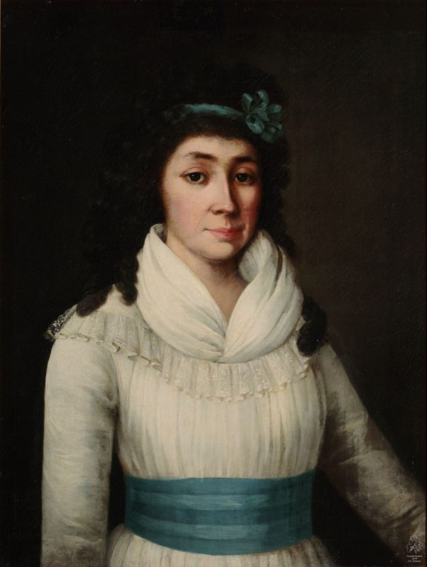 Елизавета Петровна Янькова, урождённая Римская-Корсакова (1762—1813)